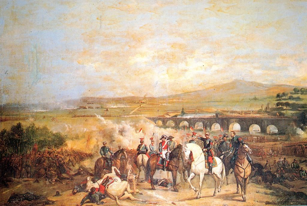 La Batalla del Puente de Alcolea, el 28 de septiembre de 1868, enfrenta a los militares sublevados contra la reina con las tropas realistas. La derrota de los realistas conlleva el final del reinado de Isabel II y su exilio. (Anónimo, Batalla de Alcolea. h. 1869. Real Academia de la Historia, Madrid)